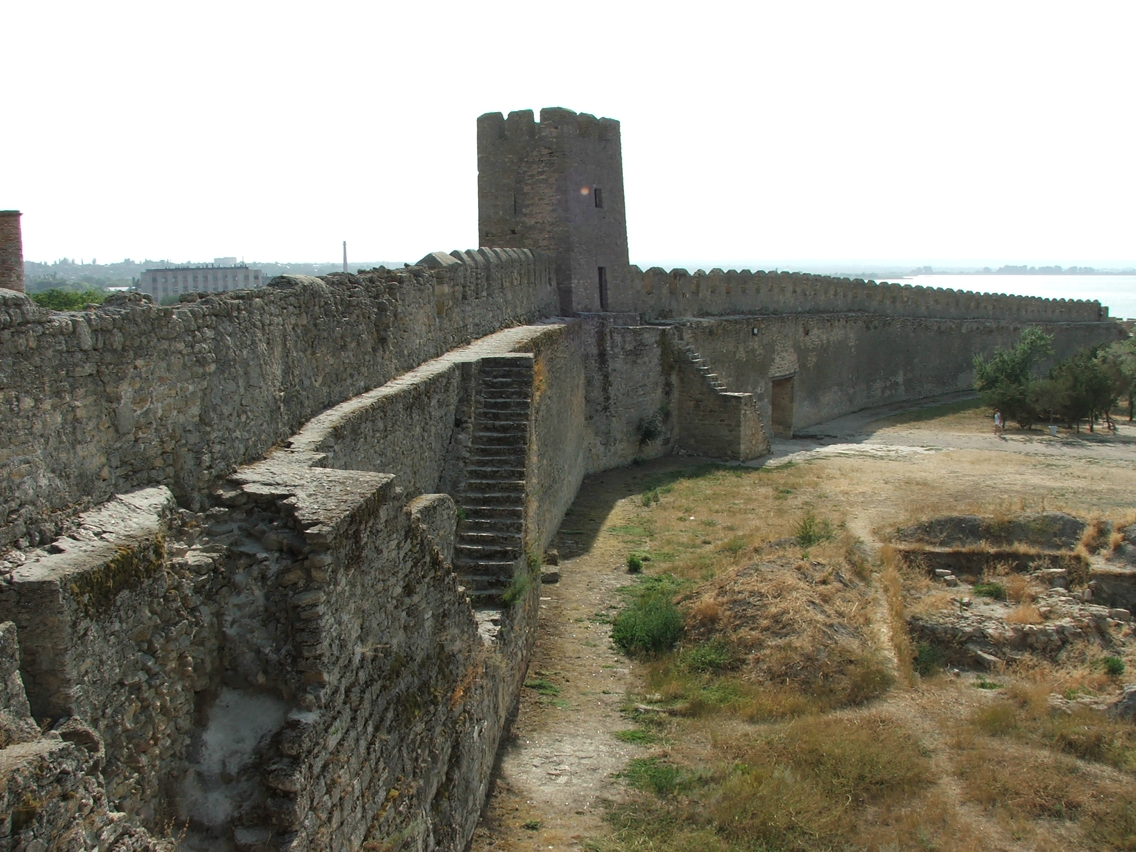 Брама, башти, мури, Білгород-Дністровський, фортеця